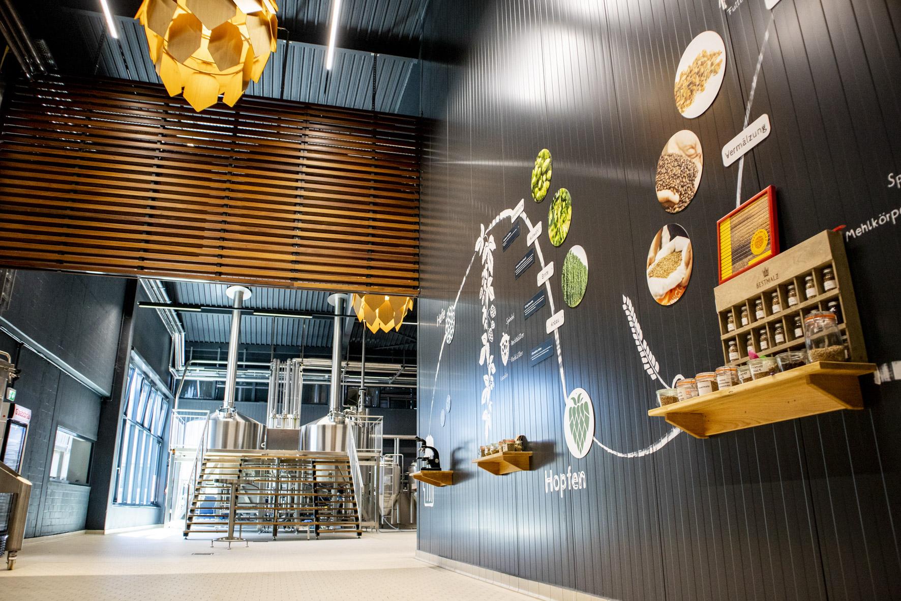 Haupteingang der Glaabsbräu in Seligenstadt.